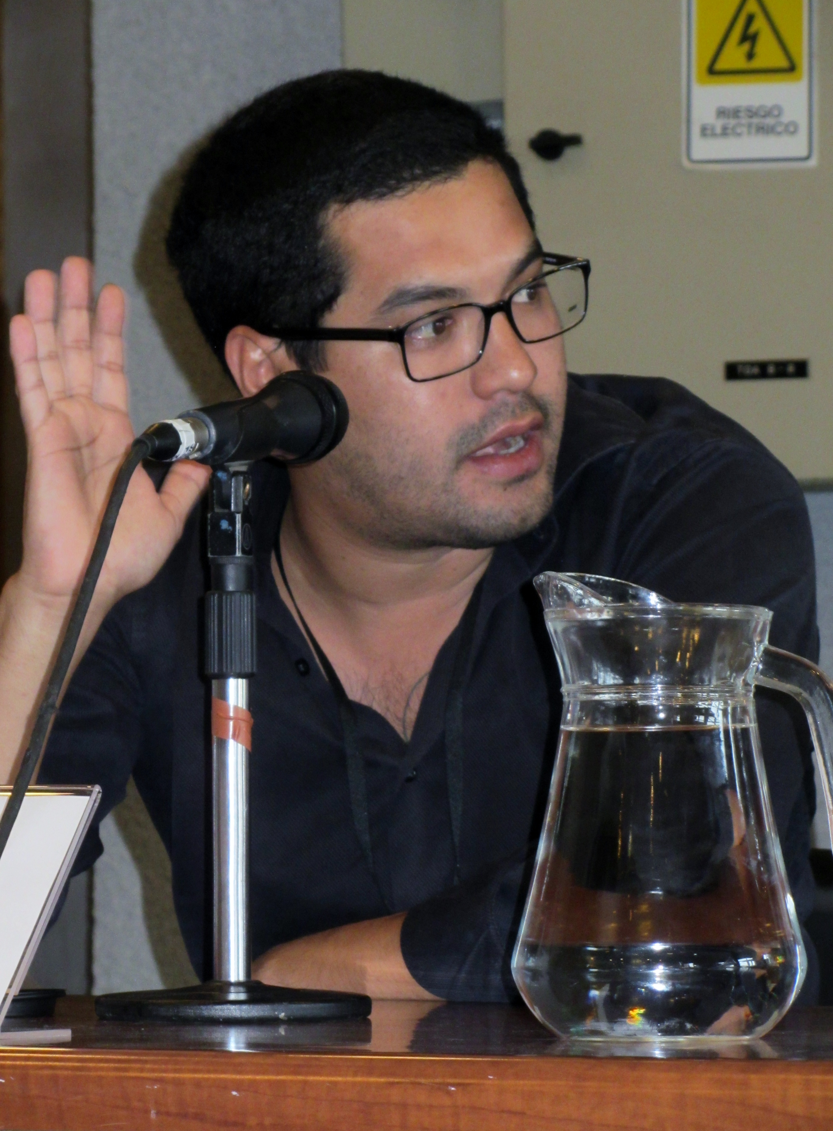 El periodista y escritor salvadoreño Óscar Martínez en la Feria Internacional del Libro de Santiago 2015